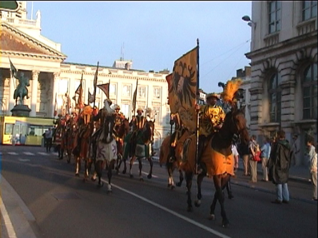 Photo prise par Utilisateur:Fistos le 30 juin 2005 à 21H15. En arrière-plan, on voit la place Royale avec l'église St Jacques et la statue équestre de Godefroid de Bouillon.